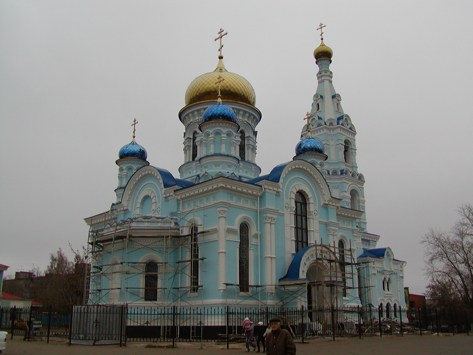 Церковь Успения Пресвятой Богородицы в Малоярославце.